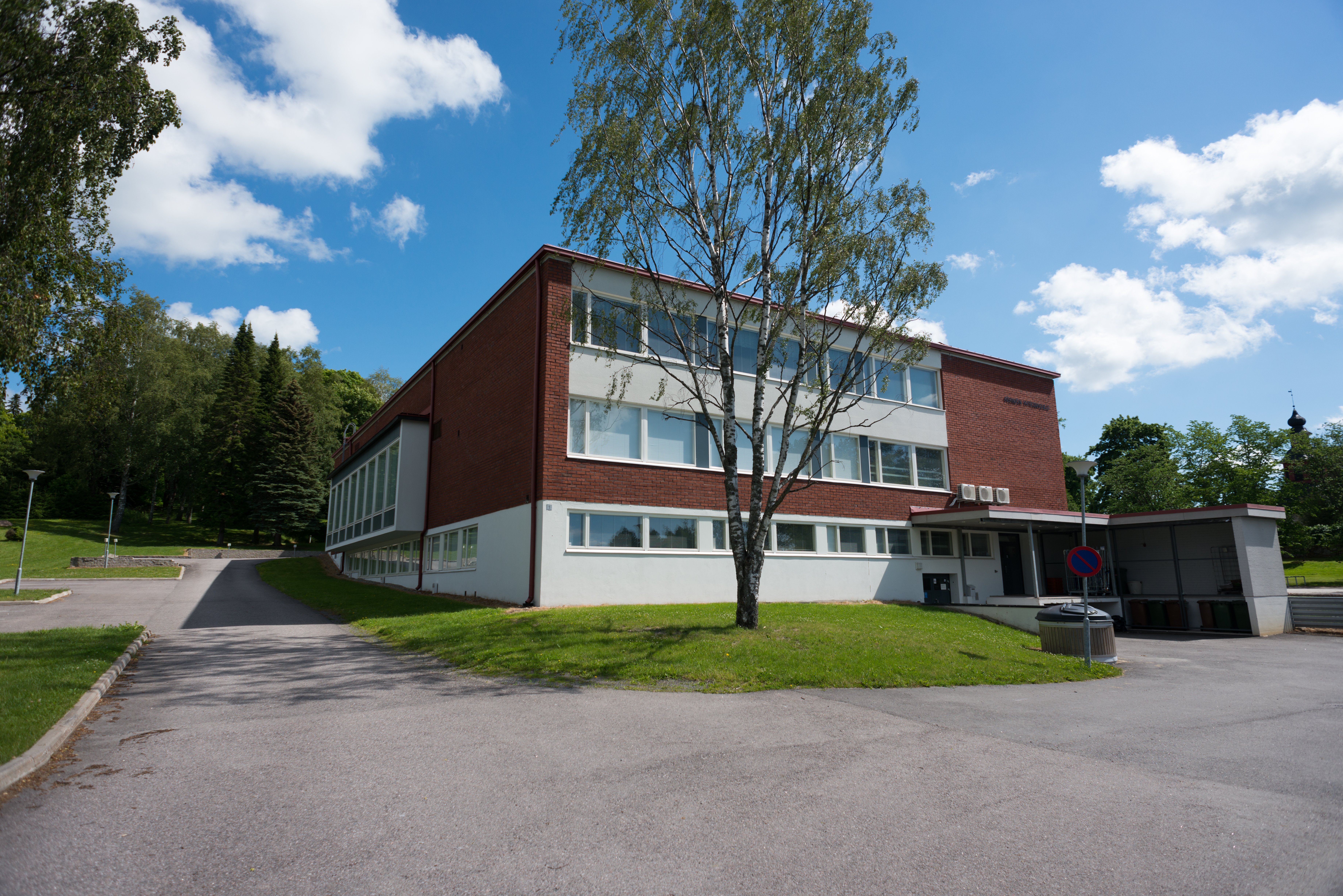 Perniön yhteiskoulu